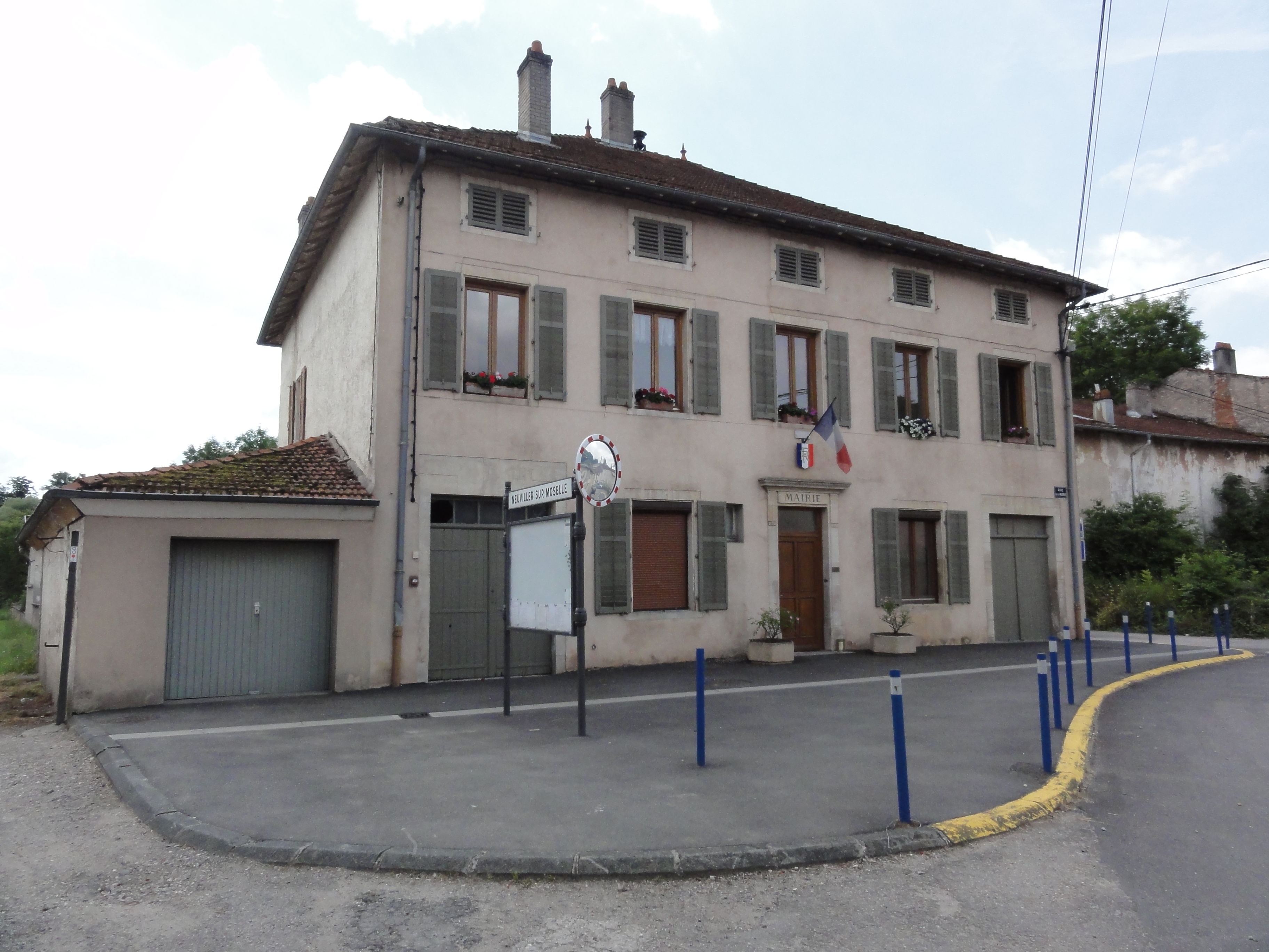 Neuviller-sur-Moselle, (M-et-M) mairie